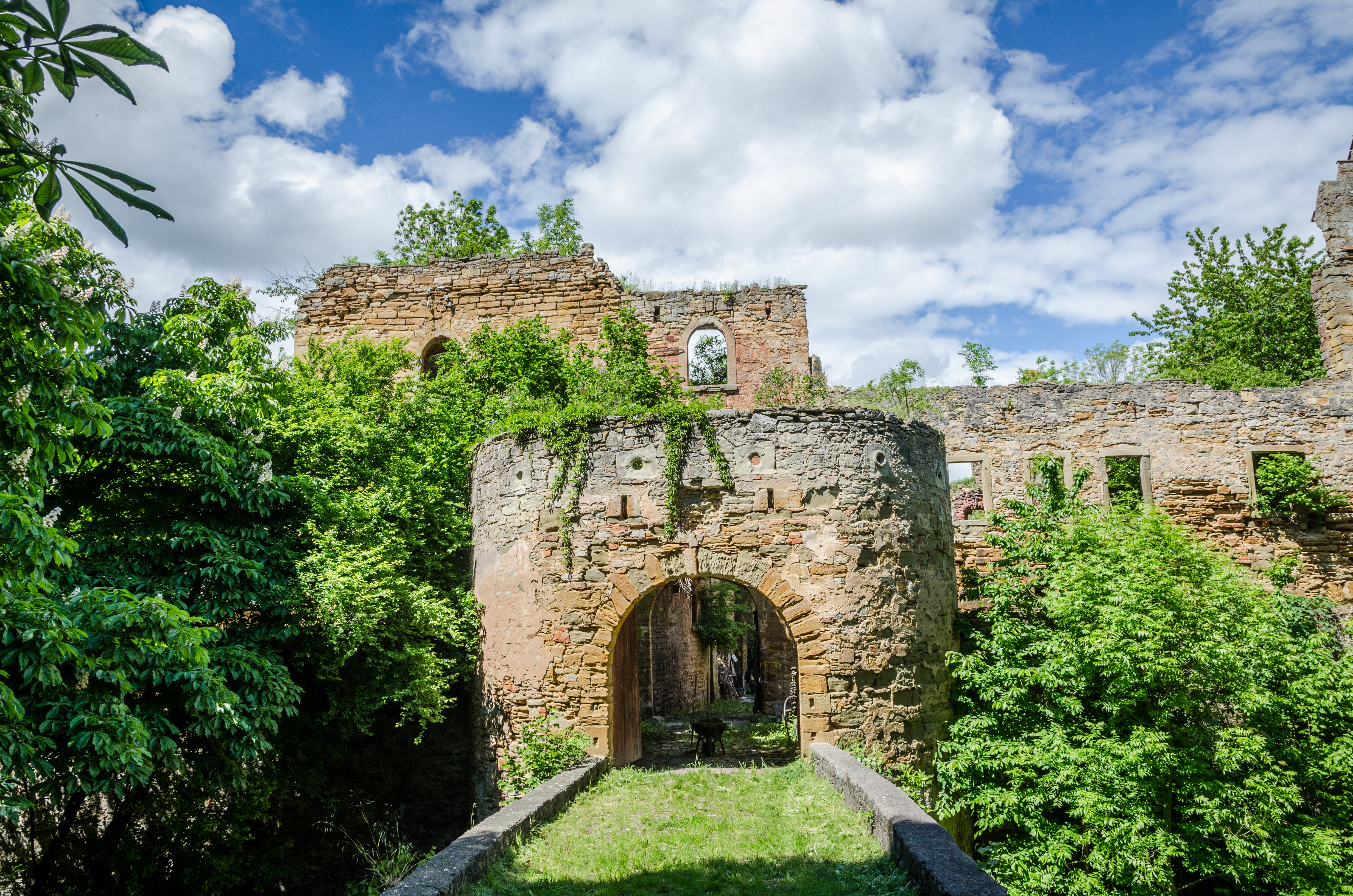 Wässerndorf, Schloßstraße 1